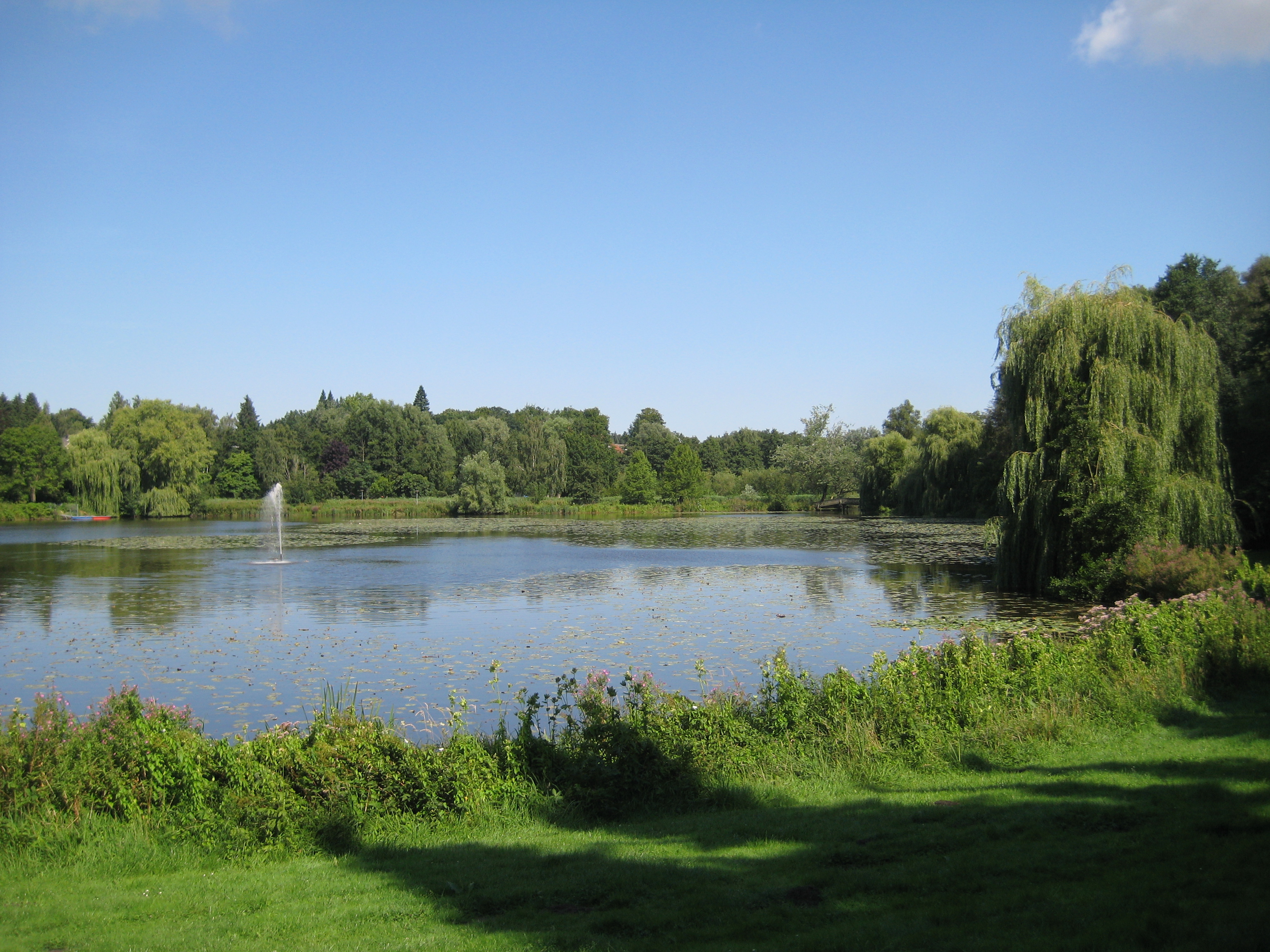 Im Naturerlebnisraum Bad Schwartau "Schwartautal" Der Kurpark mit dem Schwartauer See ist Teil des Naturerlebnisraumes.